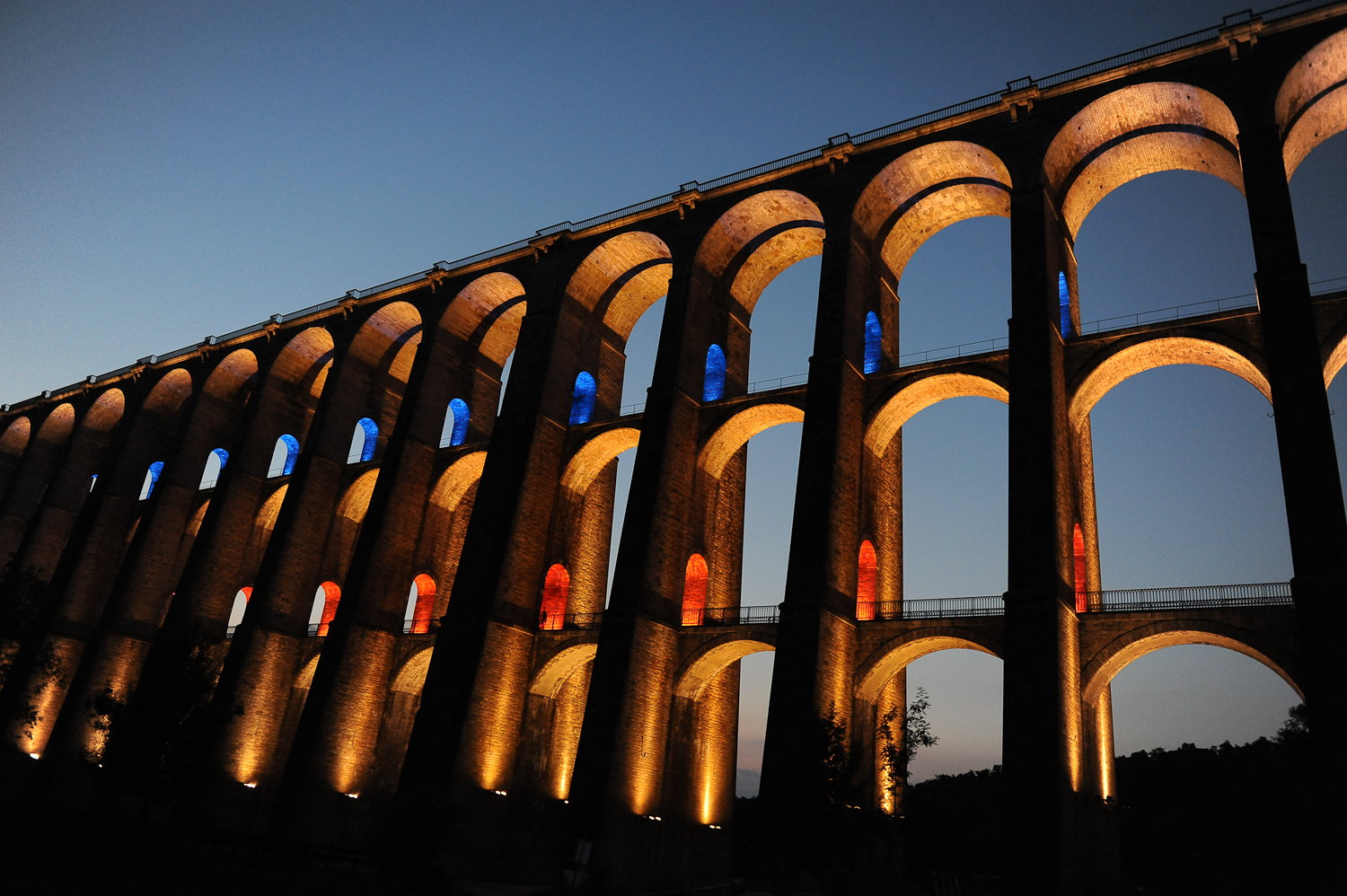 Le viaduc de Chaumont, pont ferroviaire. 1856